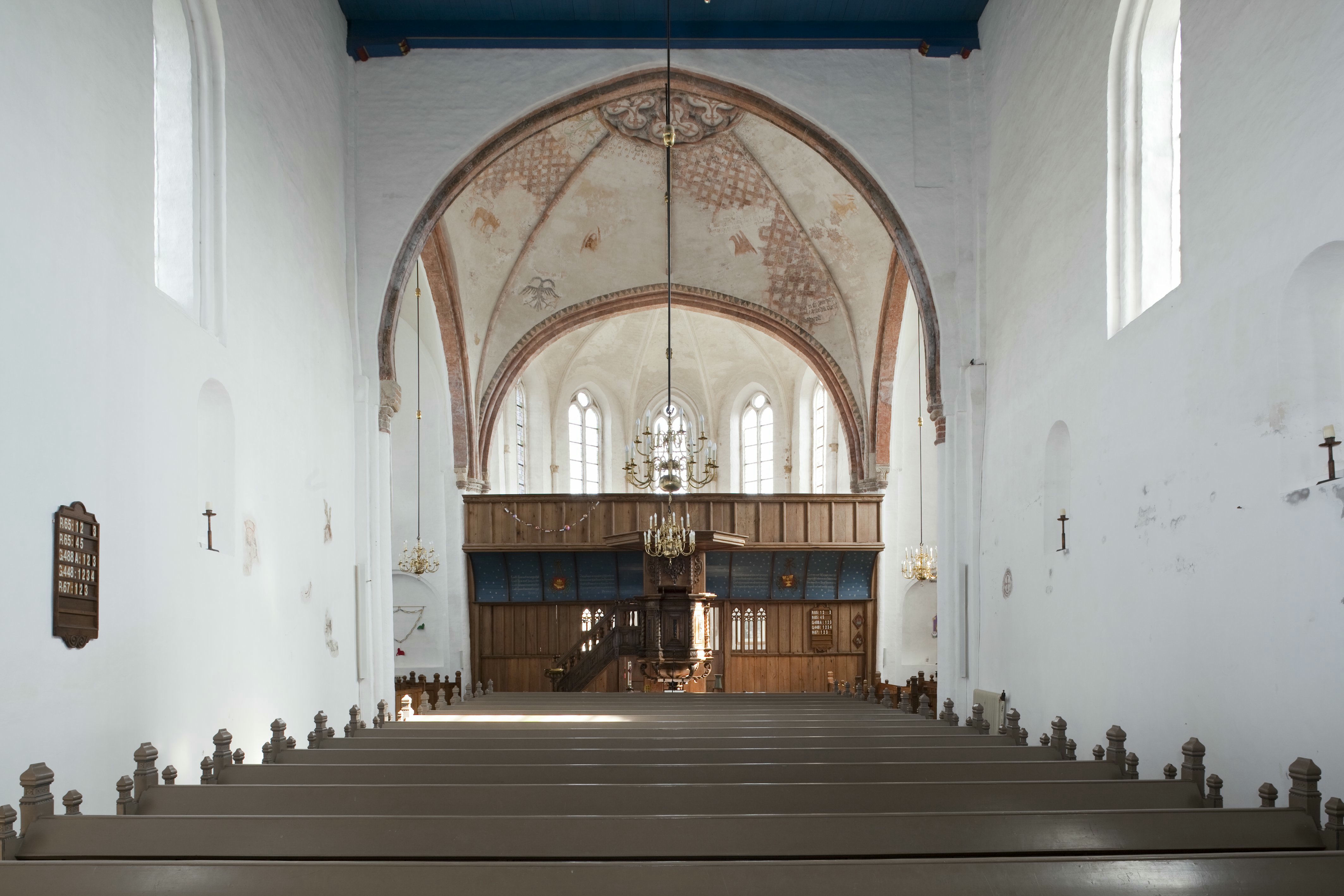 Stefanuskerk: Overzicht schip van de kerk naar het oosten